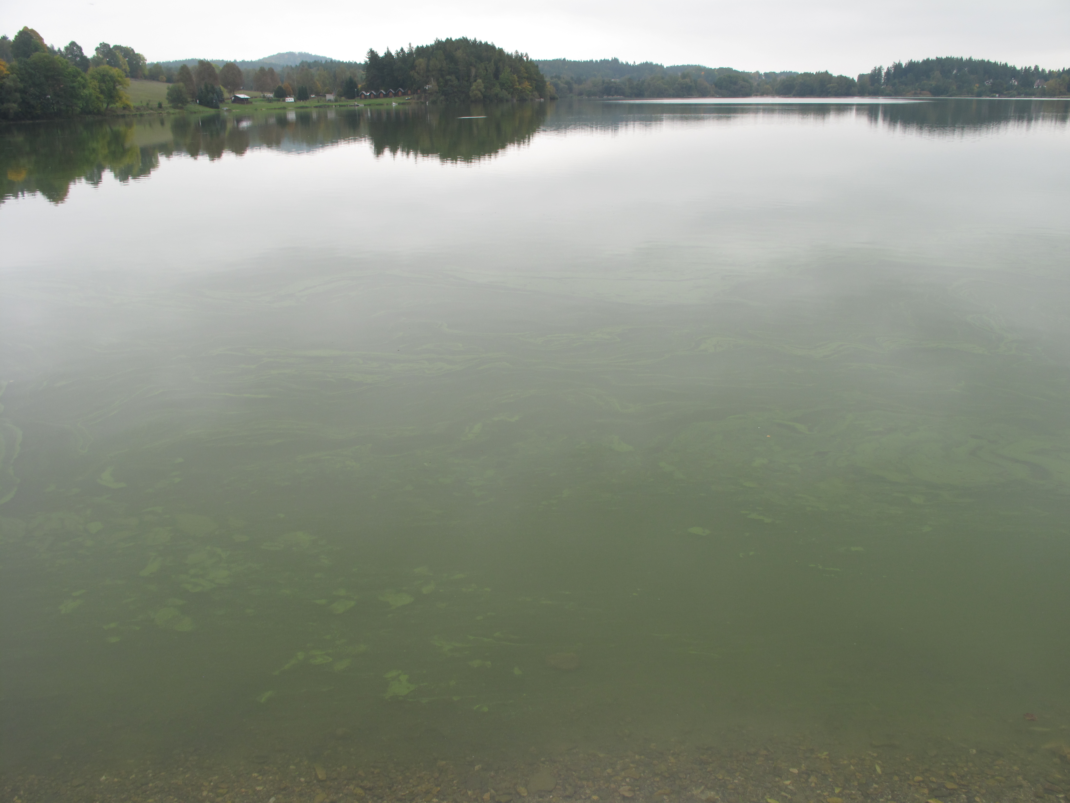 Hnačovský rybník. Okres Klatovy, Česká republika.